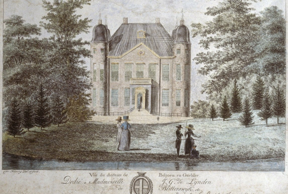 Kasteel Biljoen: Aanzicht van het kasteel met zich verpozende mensen op de voorgrond, gravure van Chr. Henning